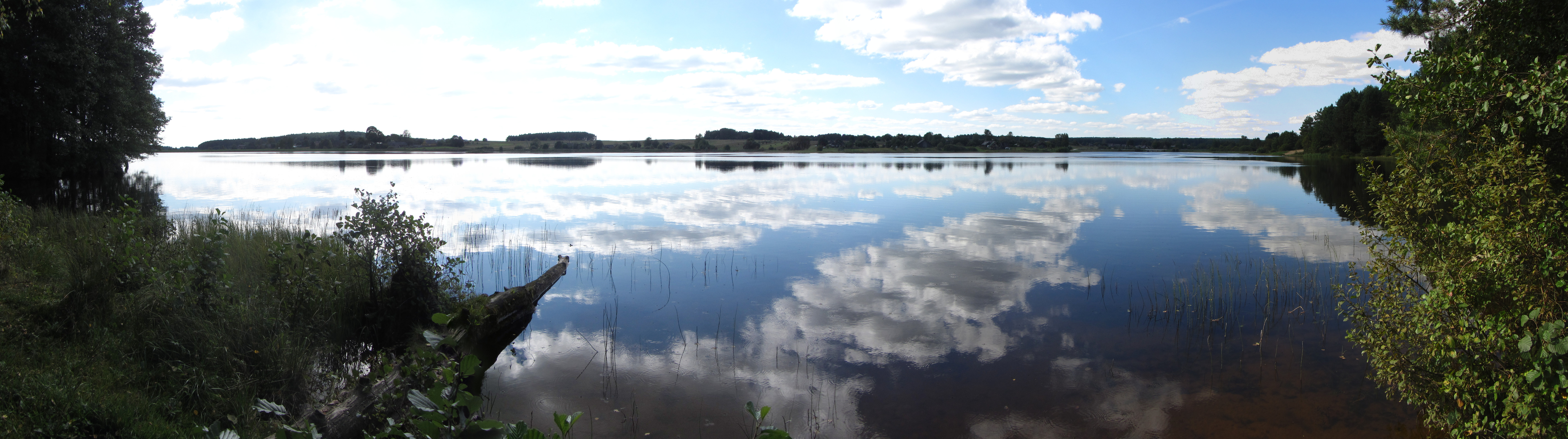 Poškonys, Lithuania